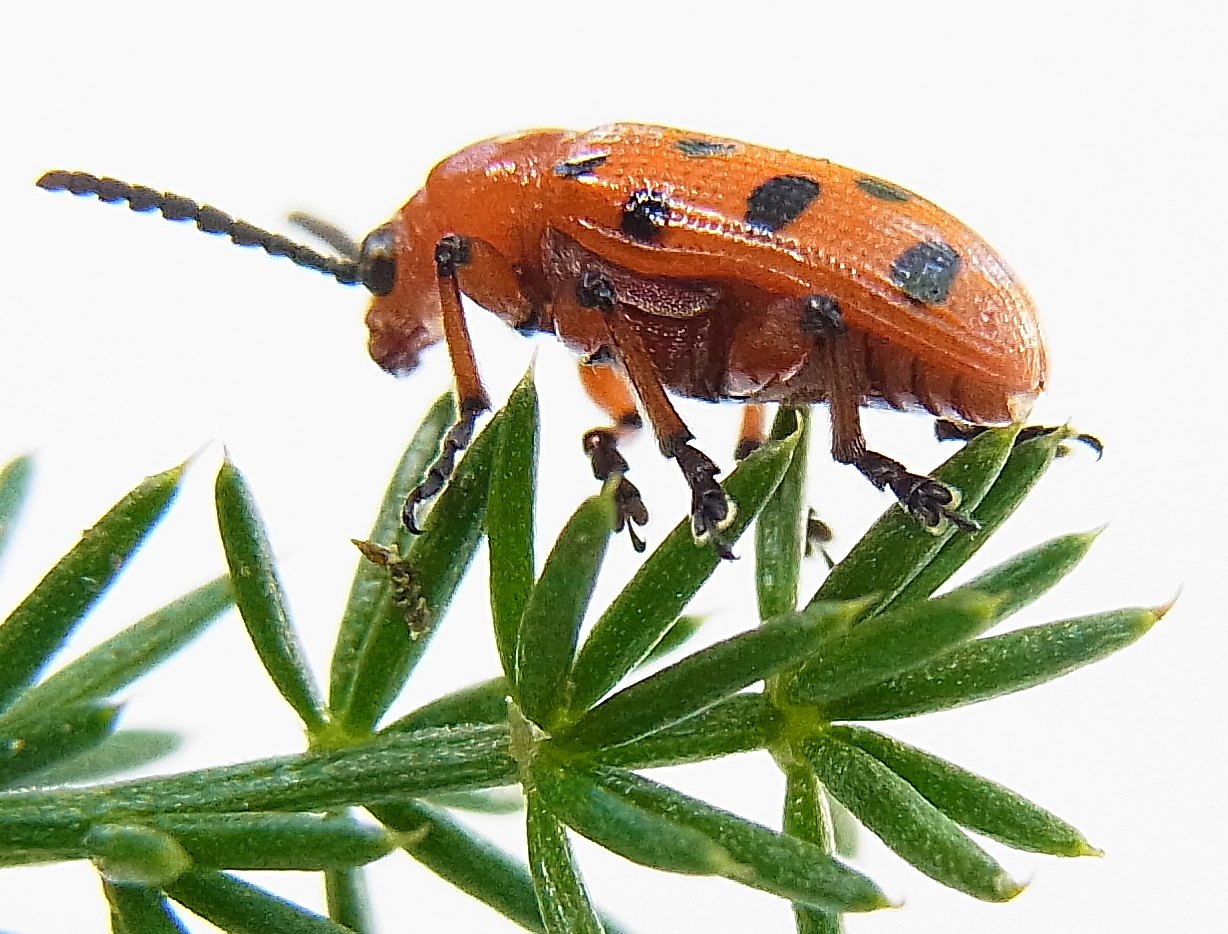 Crioceris duodecimpunctata von Spanien, Katalonien, La Llacuna, Camping Vilademager am 16. Juni 2013